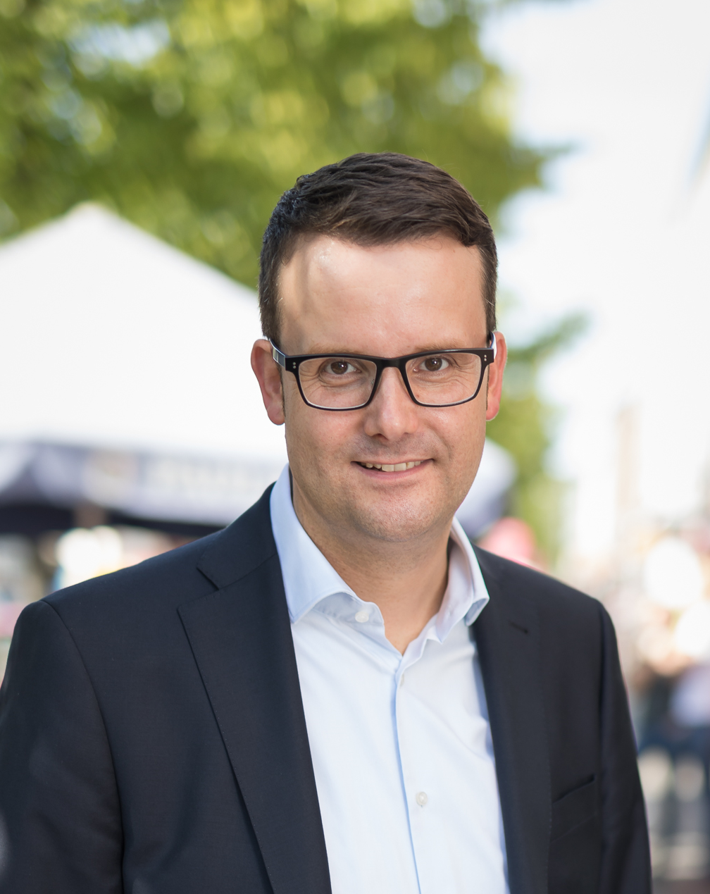 Christian Grascha, Parlamentarischer Geschäftsführer der FDP-Fraktion im Landtag Niedersachsen